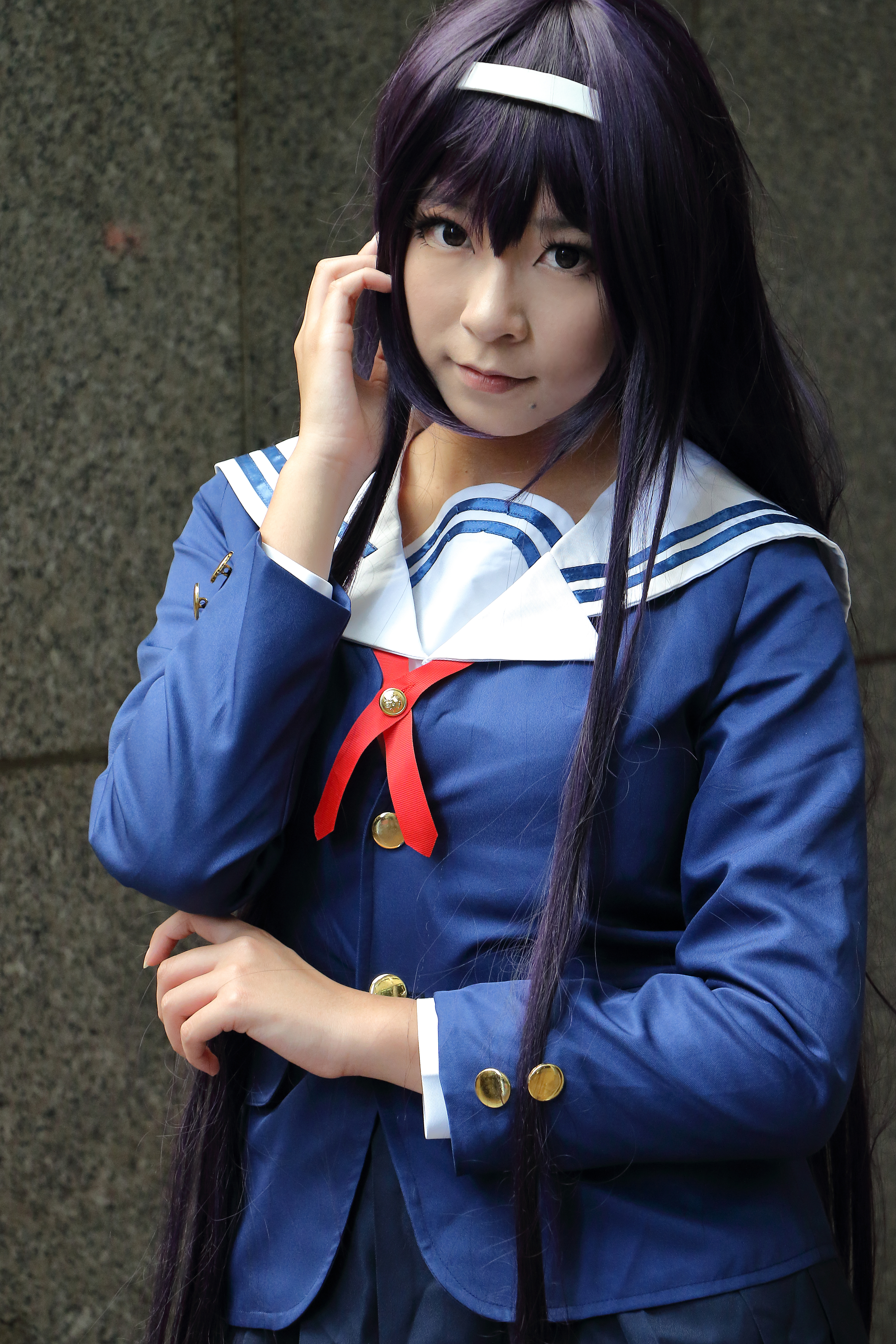 2016台北市政府動漫嘉年華，《不起眼女主角培育法》霞之丘詩羽cosplayer。